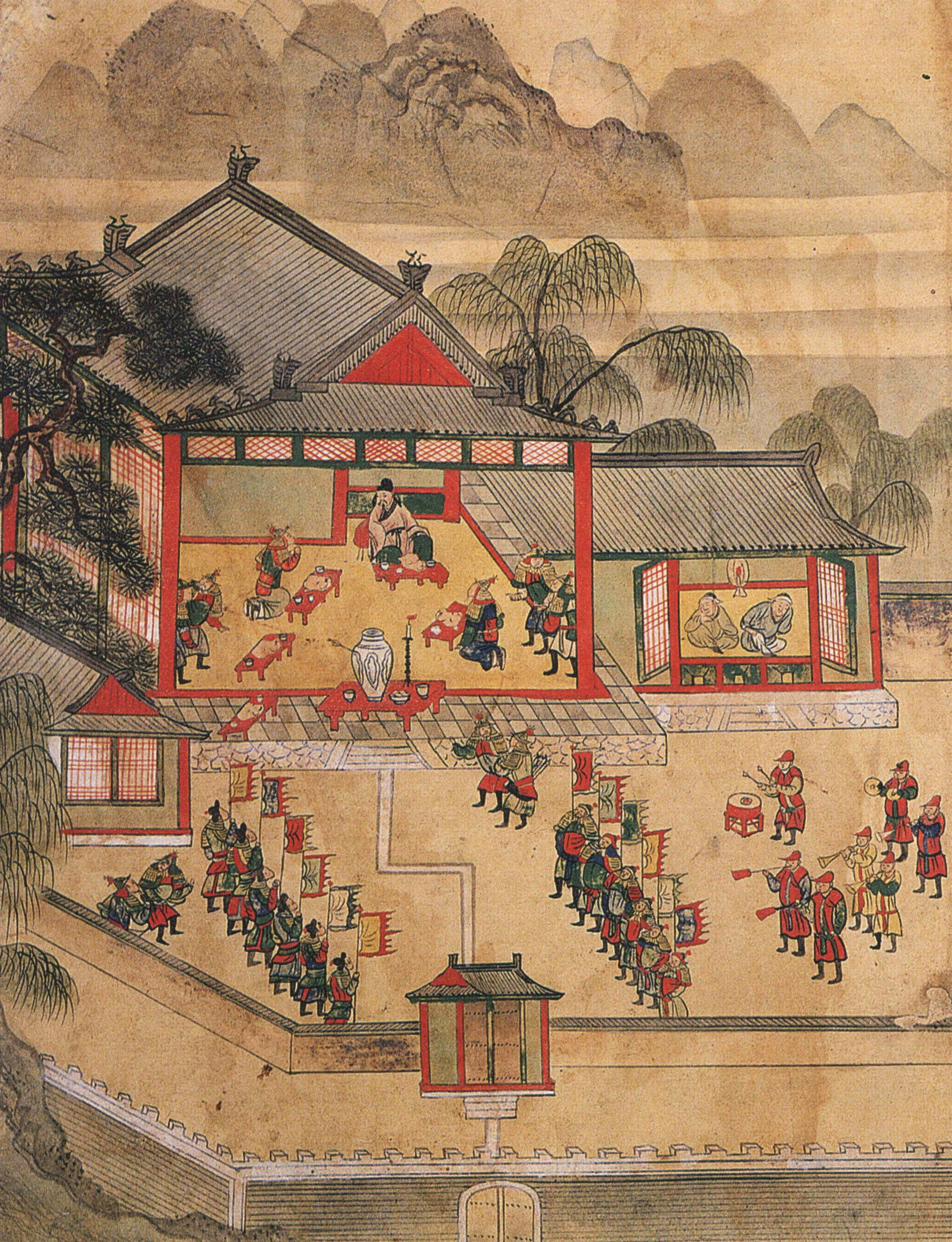 북관유적도첩(北關遺蹟圖帖)-야연사준도(夜宴射樽圖)